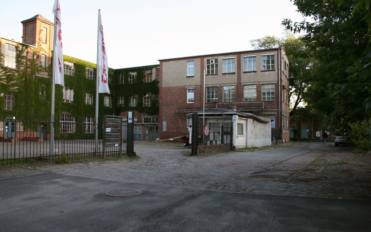 Berlin-Spandau, Zitadellenweg 20E, Produktionsgebäude der Gewehrfabrik